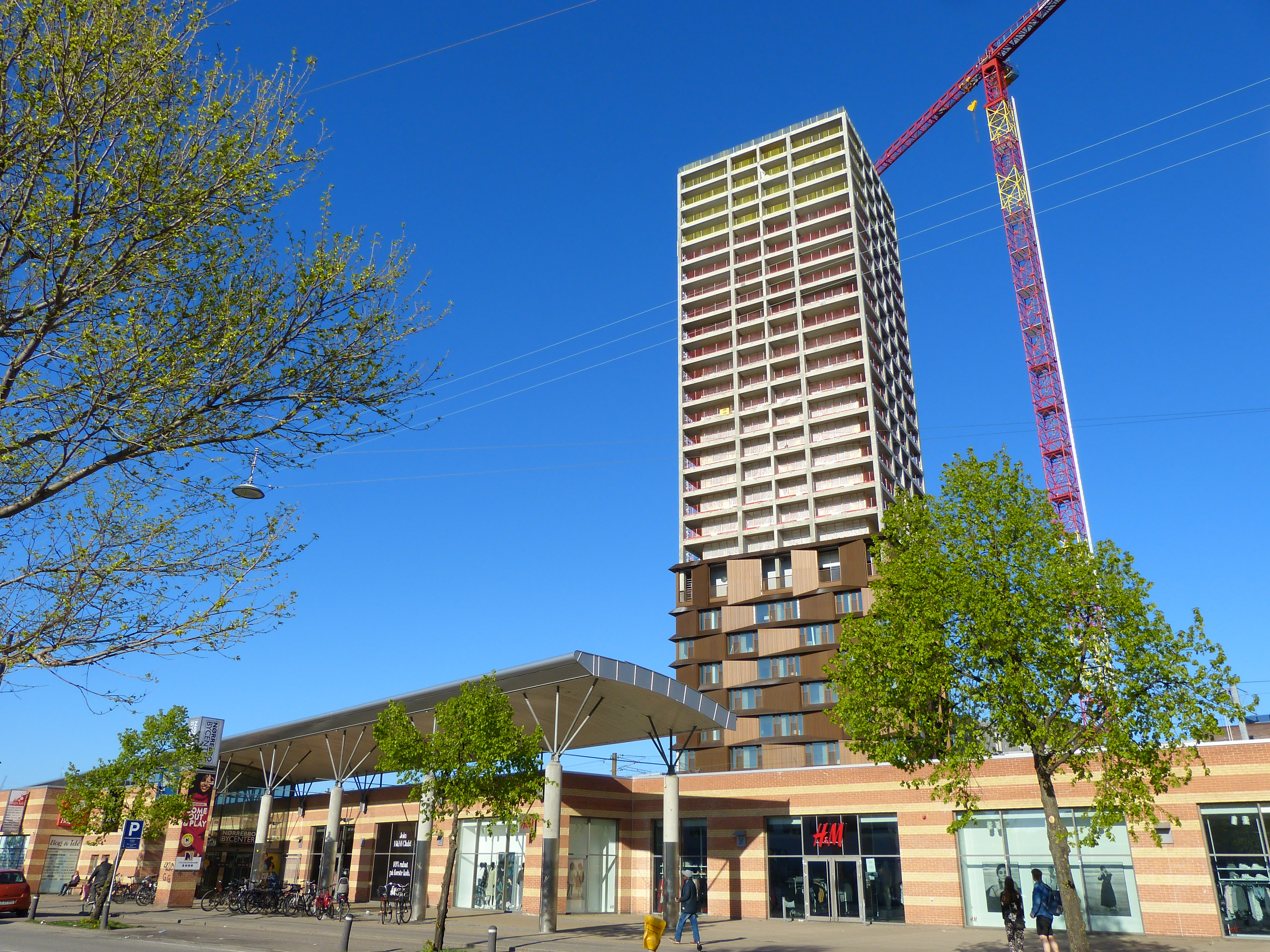 Stedet er over for Nørrebro Bycenter, taget på en forårsdag